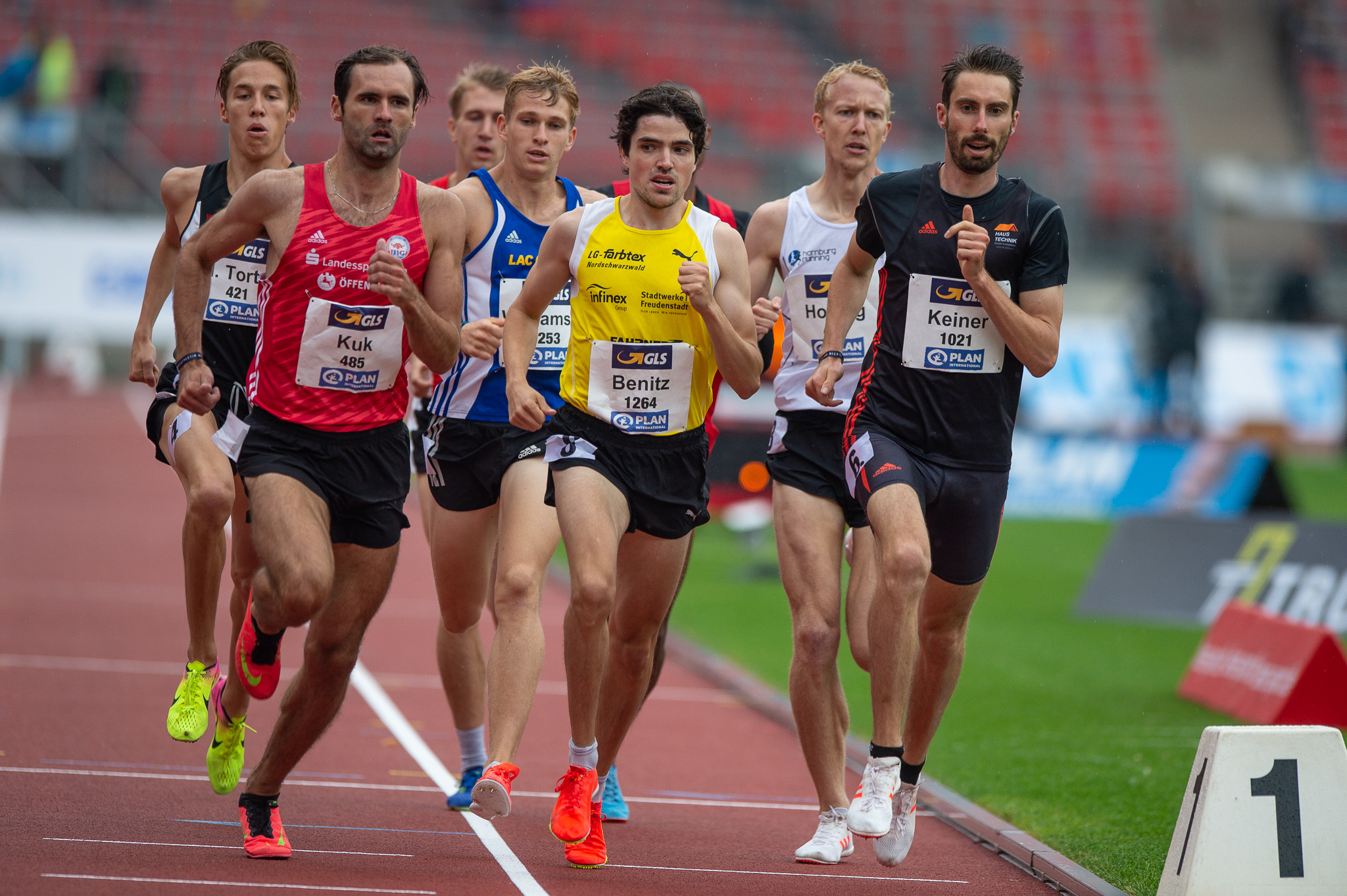 1500-Meter-Lauf,DLV,Deutsche Leichtathletik Meisterschaften 2018,Deutscher Leichtathletik-Verband,LAC Erfurt,LG Braunschweig,LG farbtex Nordschwarzwald,Max-Morlock-Stadion,Sebastian Keiner,Timo Benitz,Viktor Kuk